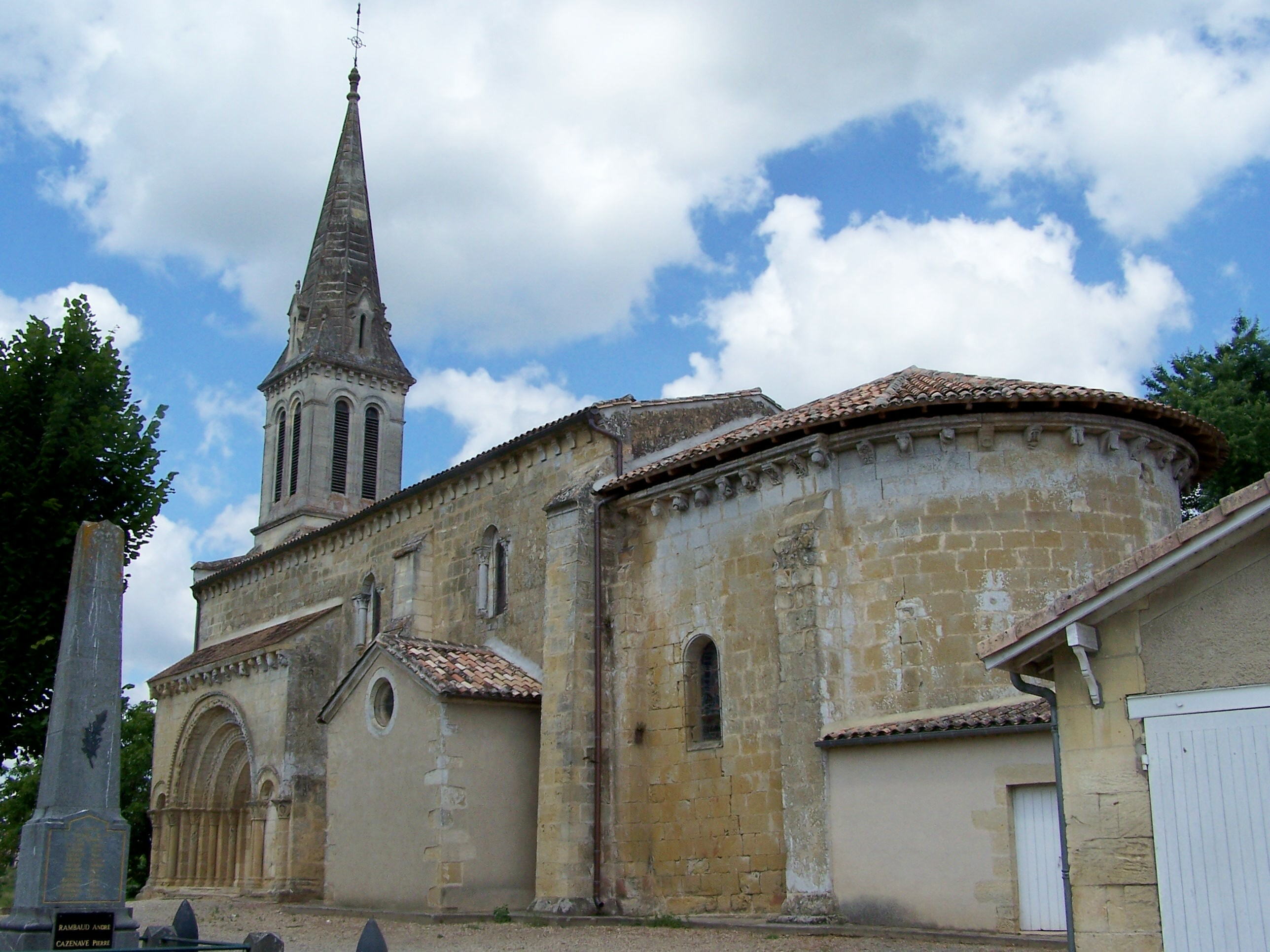 Église de Saint-Martin-de-Sescas, Gironde, France